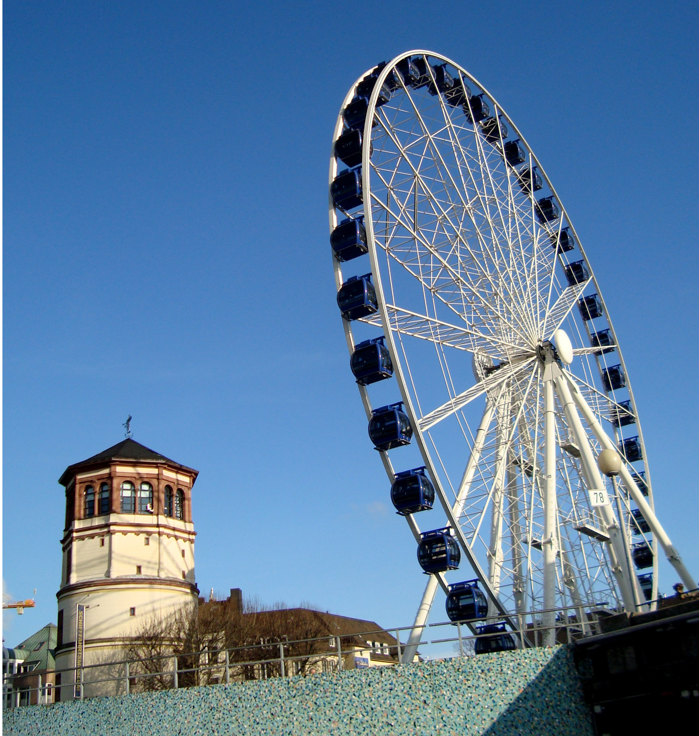 Düsseldorf, Alter Schlossturm mit Riesenrad, 2013